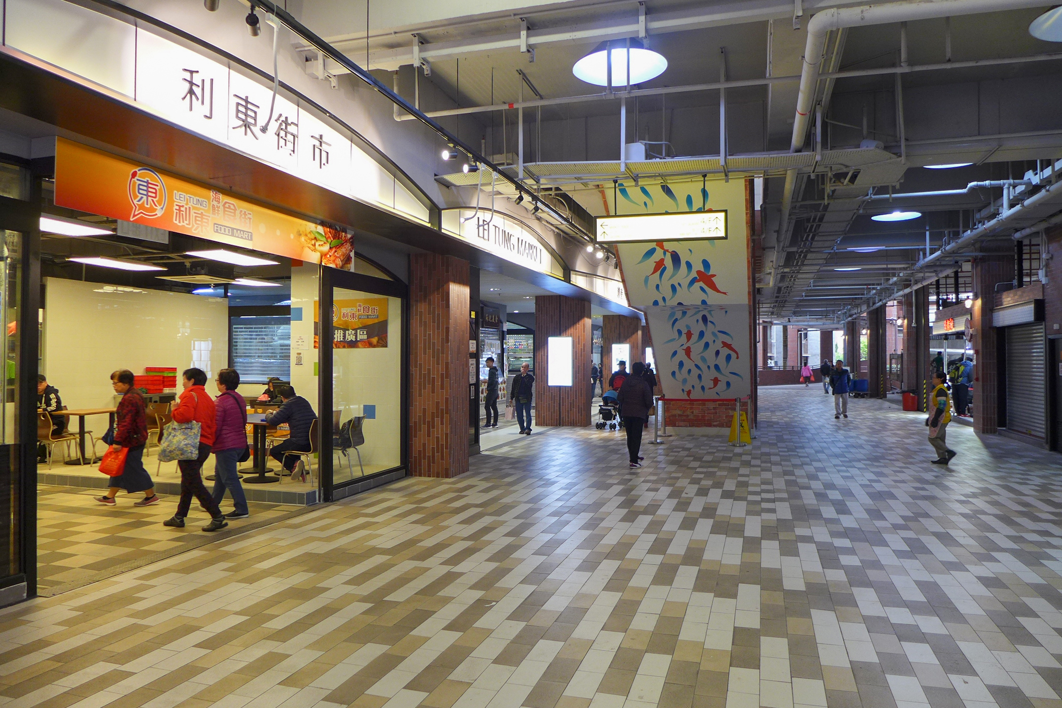 Lei Tung Market